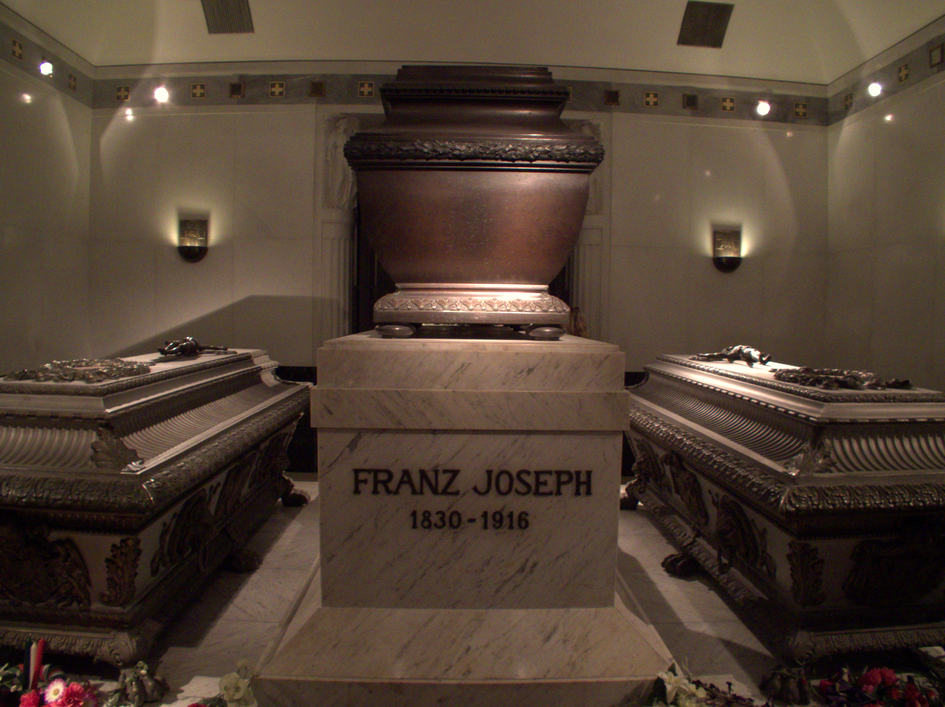 Kapuzinergruft Wien, Grablege des Hauses Habsburg